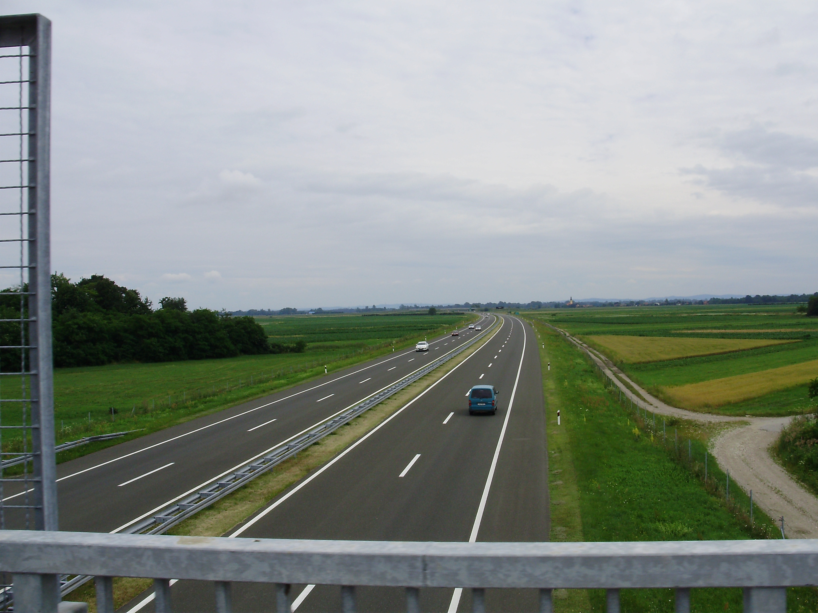 Autocesta A4